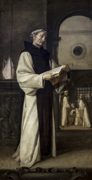 La obra representa a Fray Alfonso Fernández Pecha (1330-1389), uno de los fundadores de la Orden de San Jerónimo y posteriormente obispo de Jaén entre los años 1367 y 1368, durante el reinado de Pedro I de Castilla.